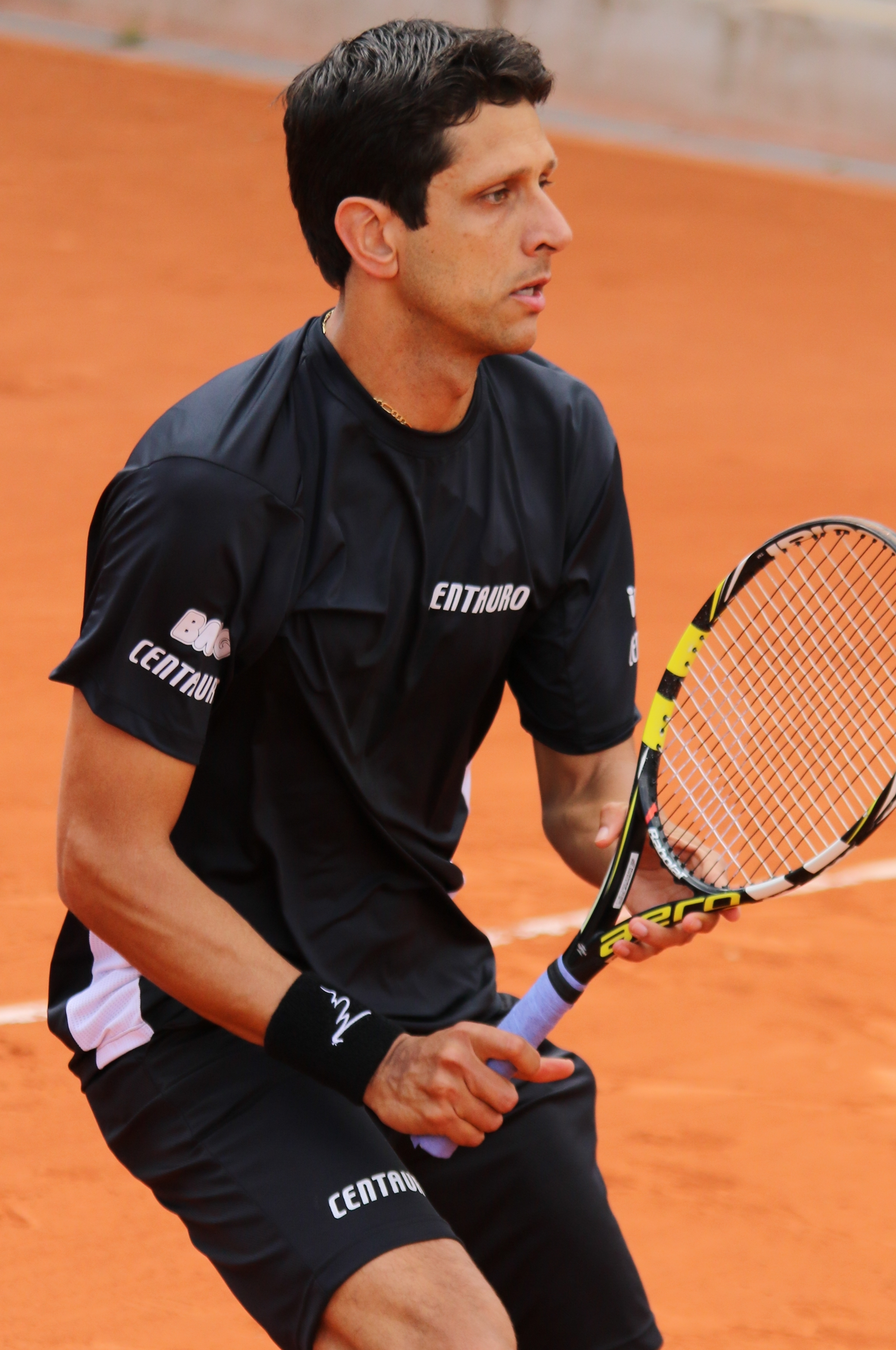 Melo RG19 (7)